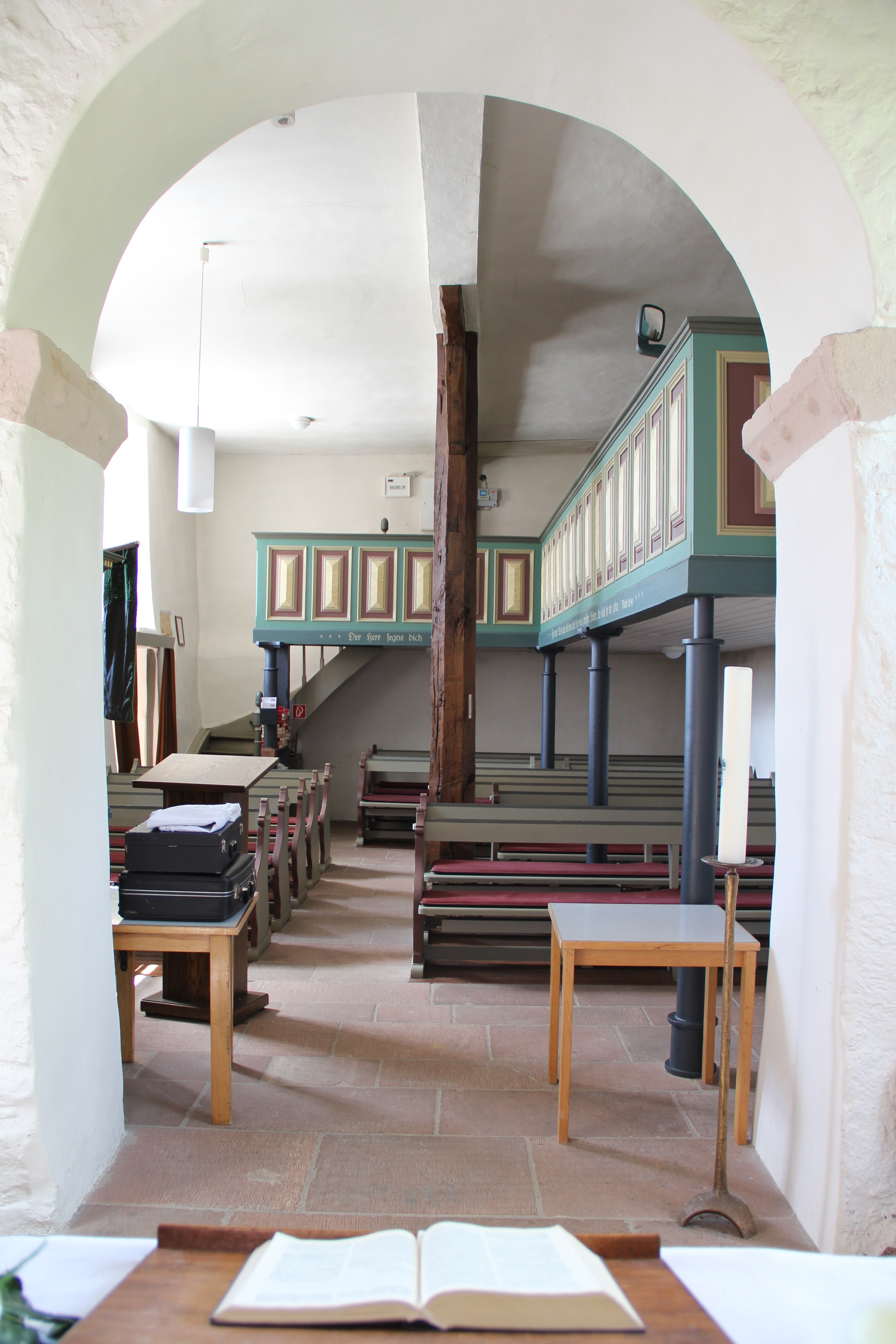 Innenraum Richtung Westen der Mainzlarer Kirche, Staufenberg, Kreis Gießen, Hessen, Deutschland